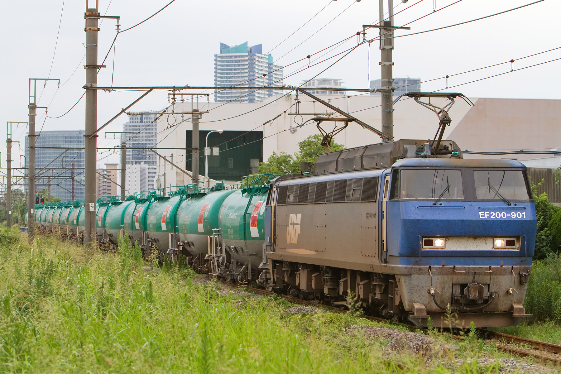 高島線をゆく貨物列車